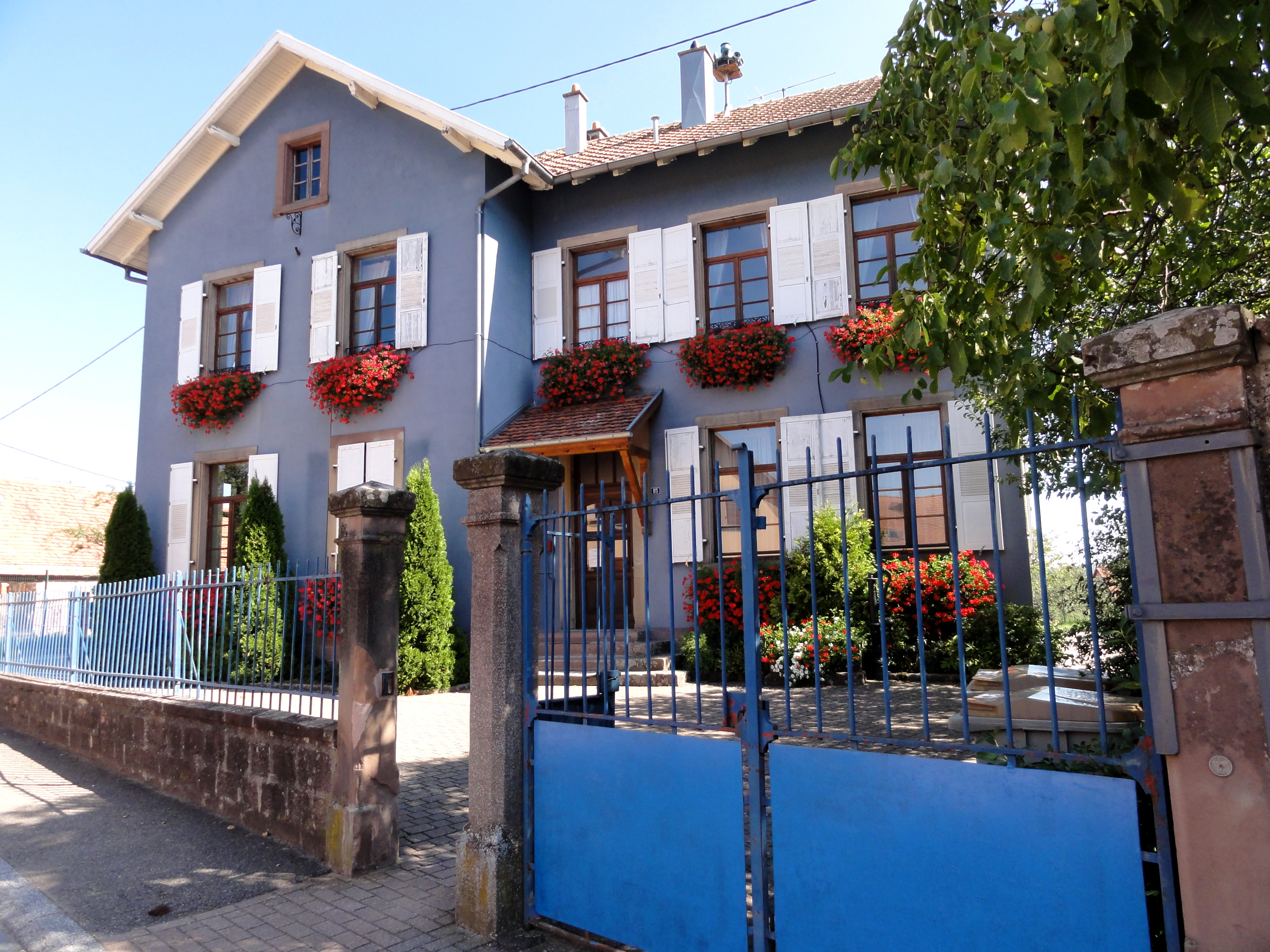 Alsace, Bas-Rhin, Neuve-Église, Mairie-école (1881), 15 rue de l'Eglise. .